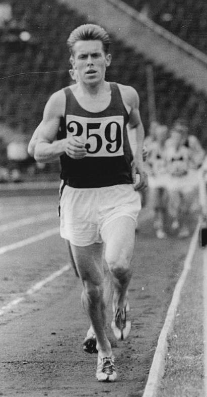 Gerhard Hönicke Zentralbild Dressel 25.7.1960 Deutsche Leichtathletikmeisterschaften im Zentralstadion in Leipzig vom 22.-24.7.1960 UBz: Gerhard Hönicke wurde Deutscher Meister über 5000 m.